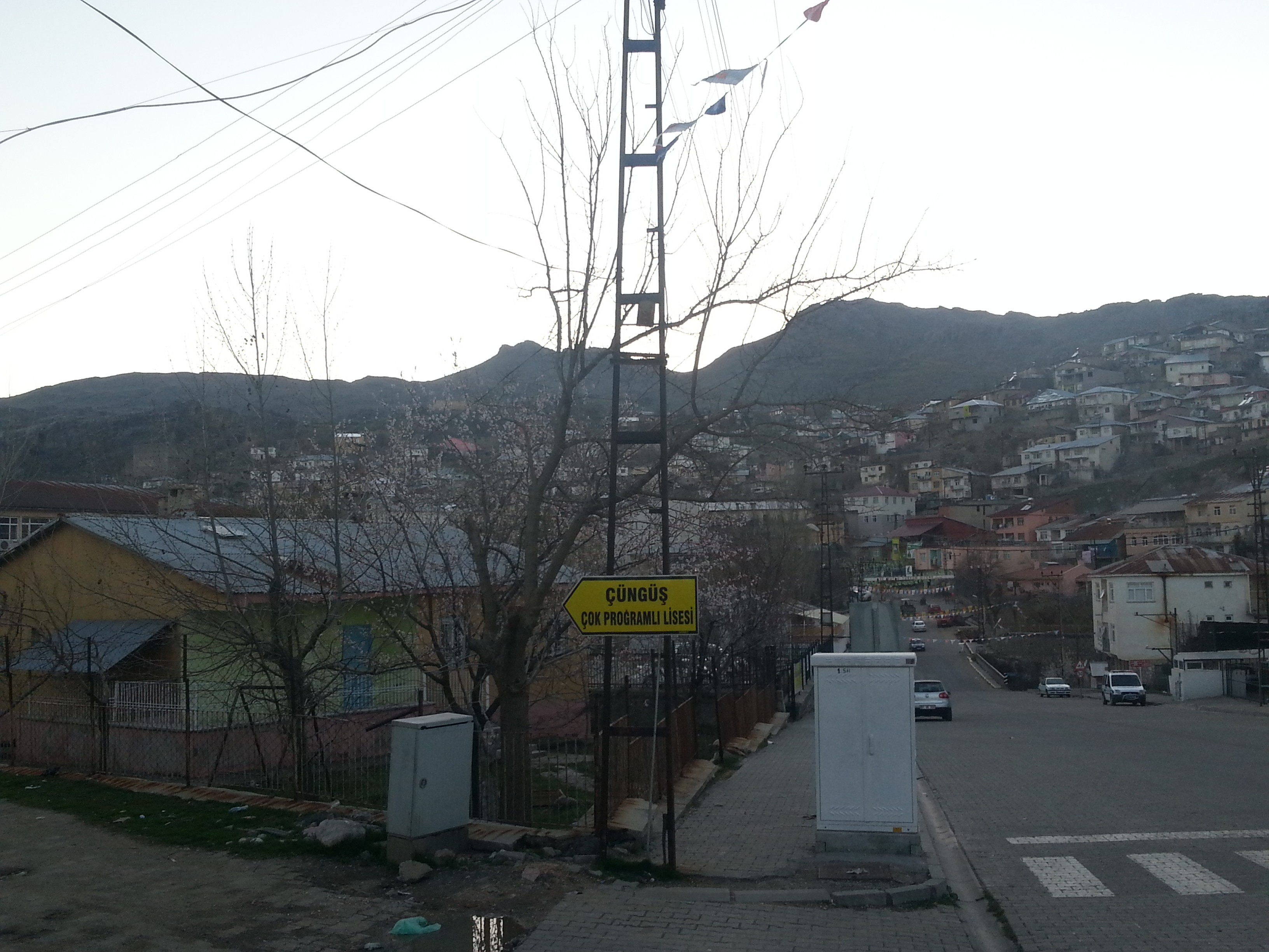 Çüngüş manzara